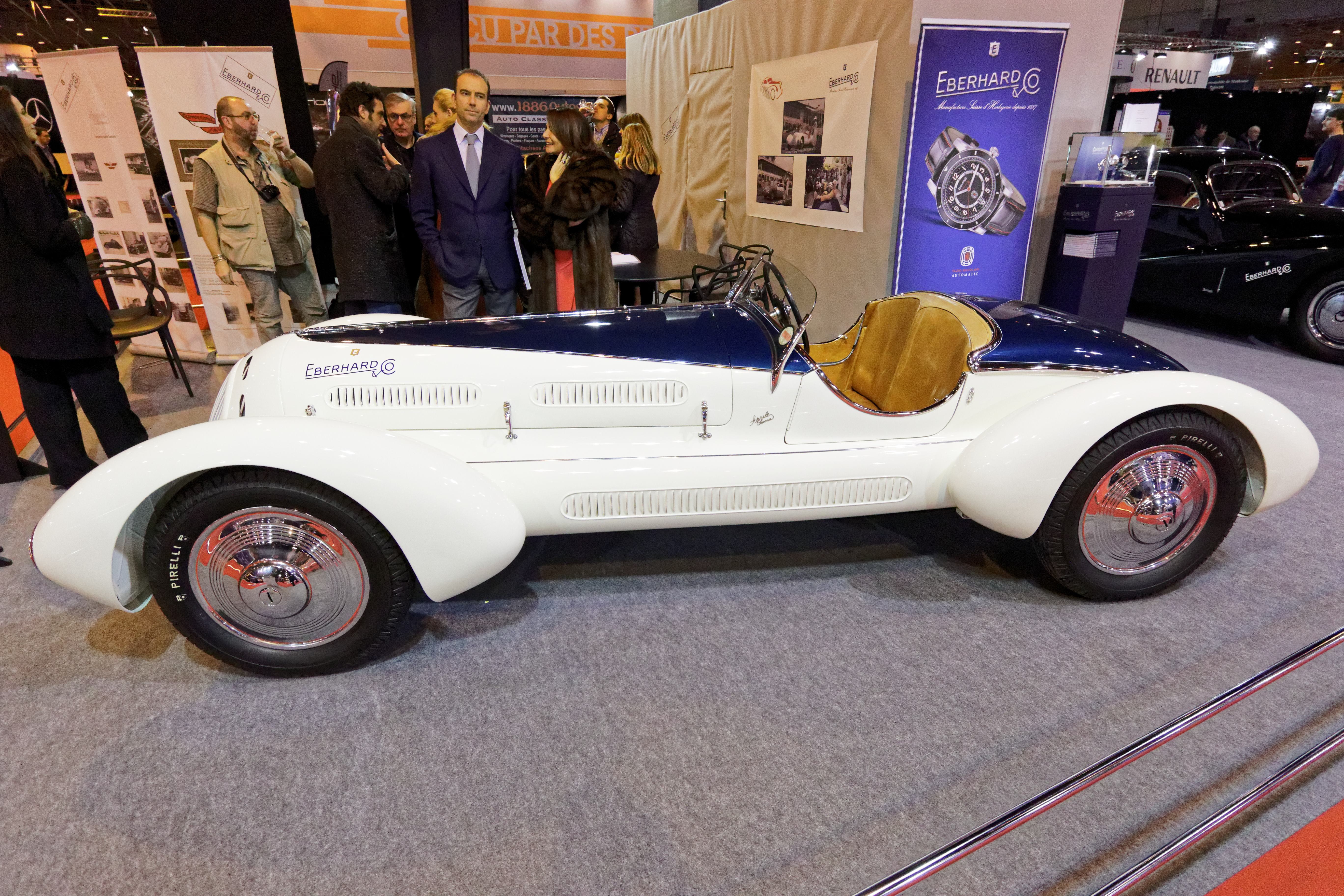 Une des voiture présentée lors du salon Rétromobile de Paris 2015